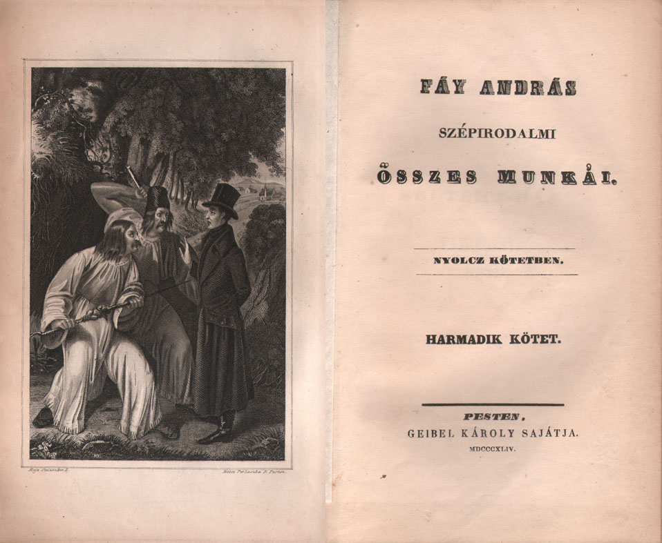 Fáy András: A Bélteky-ház második kiadásának belső két oldala.